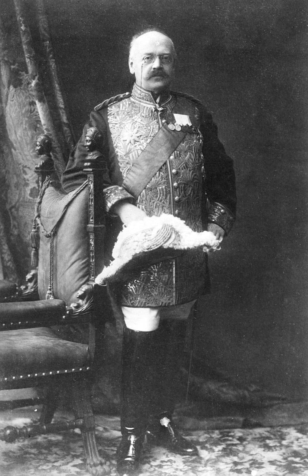 Трепов, Александр Фёдорович